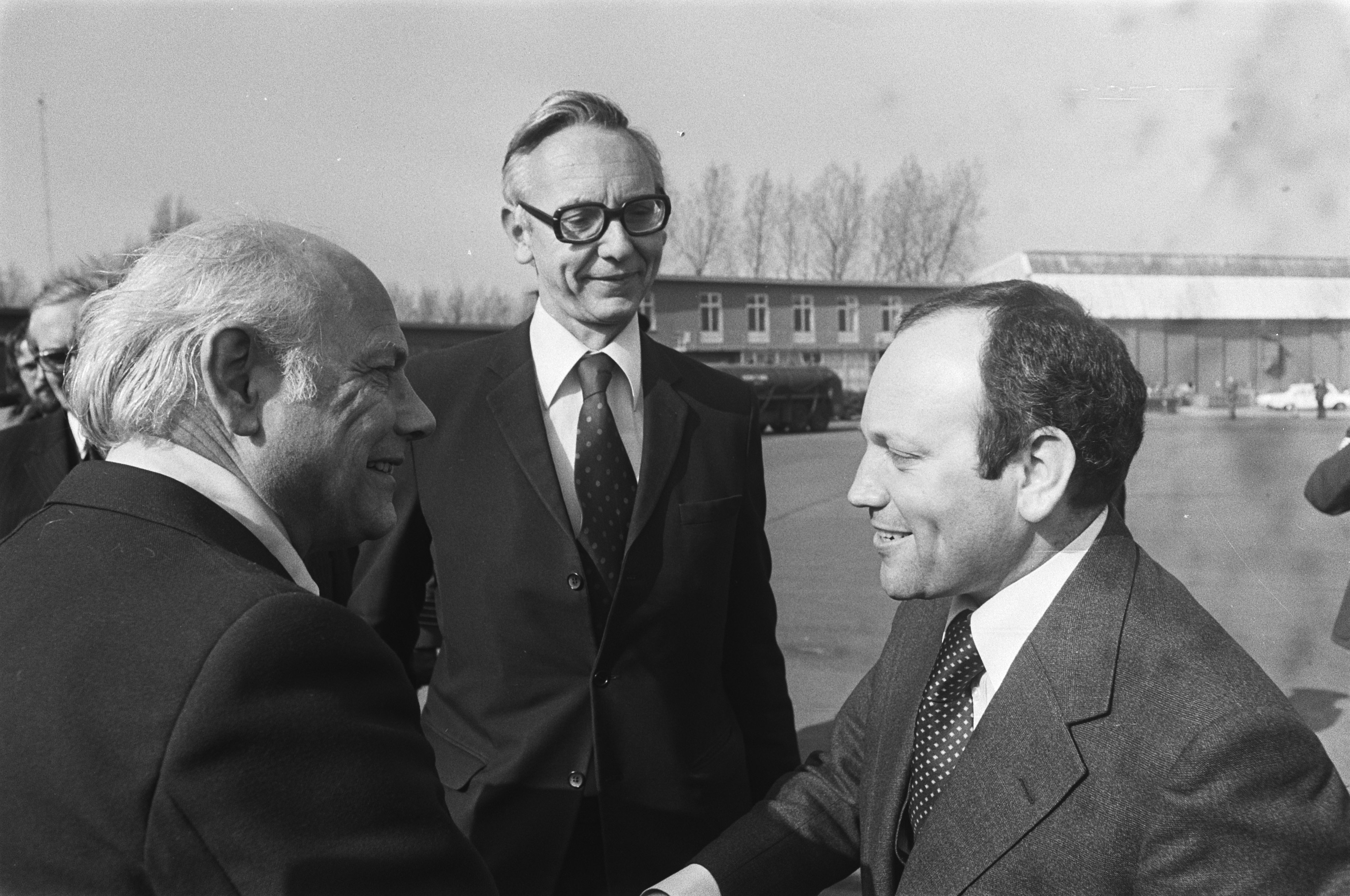 Collectie / Archief : Fotocollectie Anefo Reportage / Serie : De Portugese premier Mário Soares bezoekt Nederland Beschrijving : Den Uyl (PvdA) en Soares (PS) schudden elkaar de hand; in het midden minister van Buitenlandse Zaken Max van der Stoel (PvdA) Datum : 9 maart 1977 Locatie : Den Haag, Zuid-Holland Trefwoorden : minister-presidenten, ministers, staatsbezoeken, vliegvelden Persoonsnaam : Soares, Mário, Stoel, Max van der, Uyl, Joop den Fotograaf : Fotograaf Onbekend / Anefo, [onbekend] Auteursrechthebbende : Nationaal Archief Materiaalsoort : Negatief (zwart/wit) Nummer archiefinventaris : bekijk toegang 2.24.01.05 Bestanddeelnummer : 929-0637